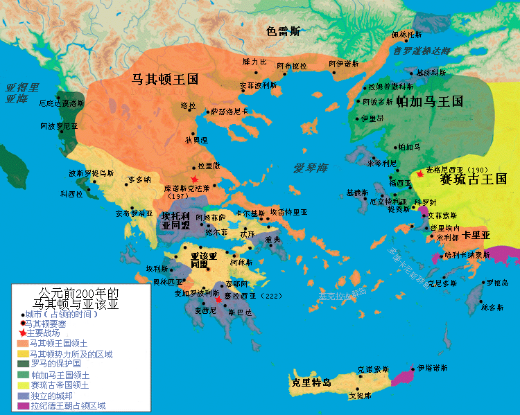 公元前200年希腊世界地图，改编自维基共享资源Macedonia and the Aegean World c.200.png。